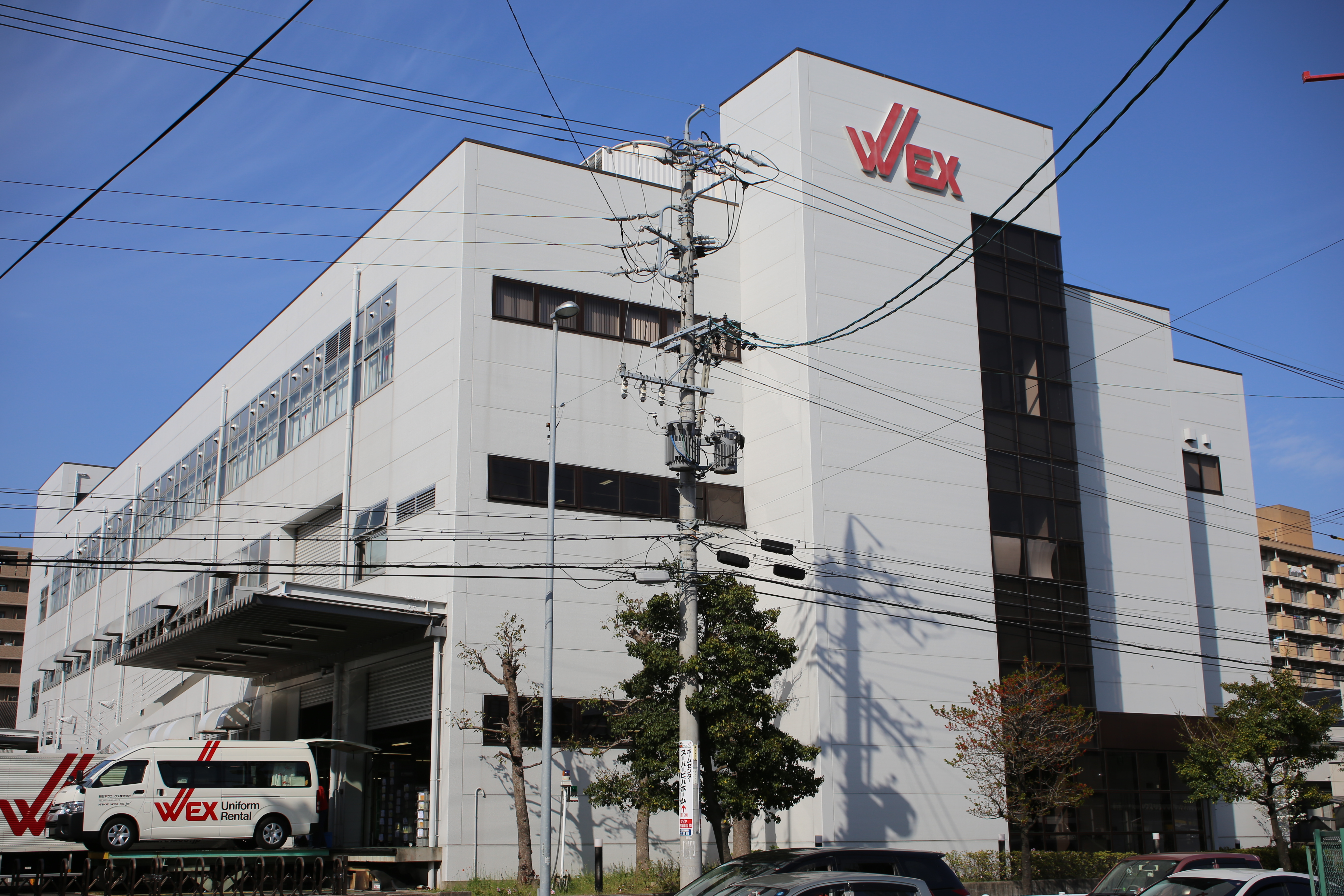 名古屋市港区木場町の新日本ウエックス本社を南側公道西側より撮影